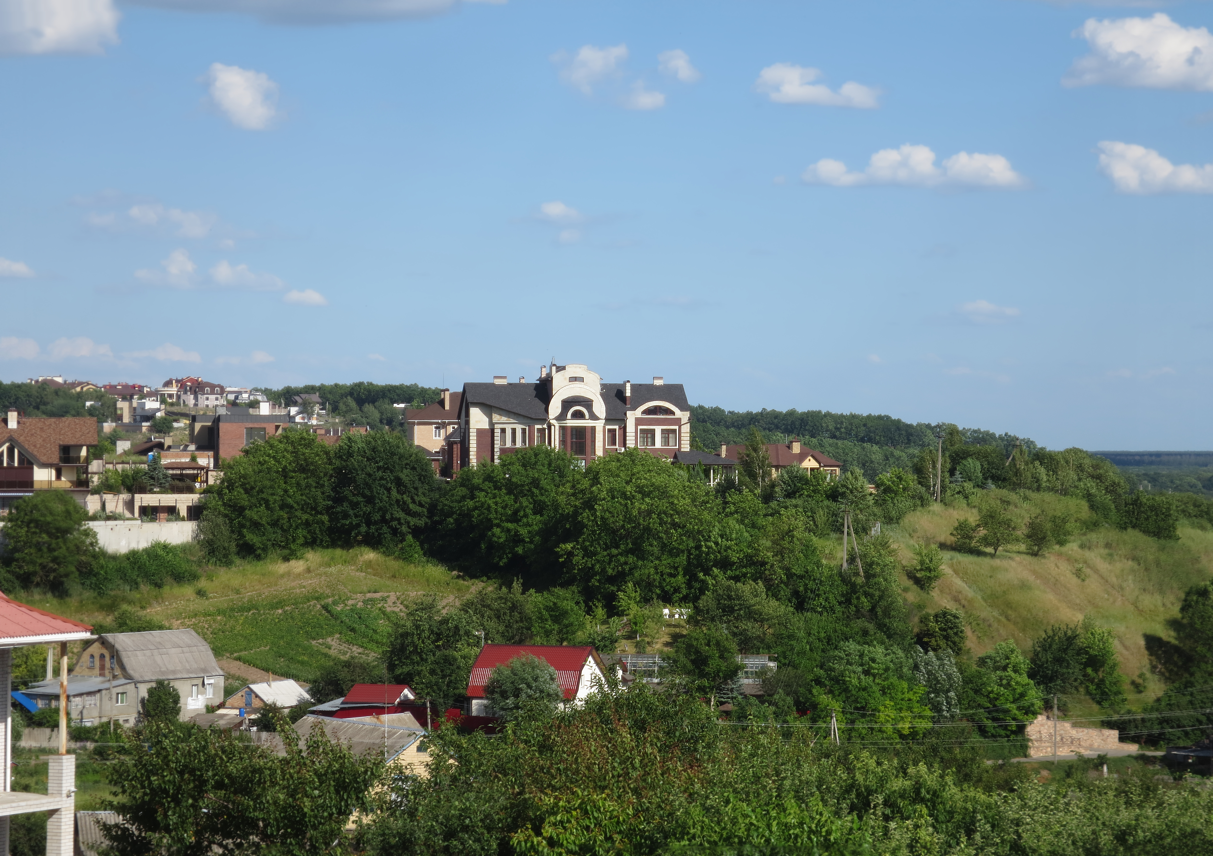 Замкова гора в селі Лісники біля Києва. 30 червня 2017, 17:03:39